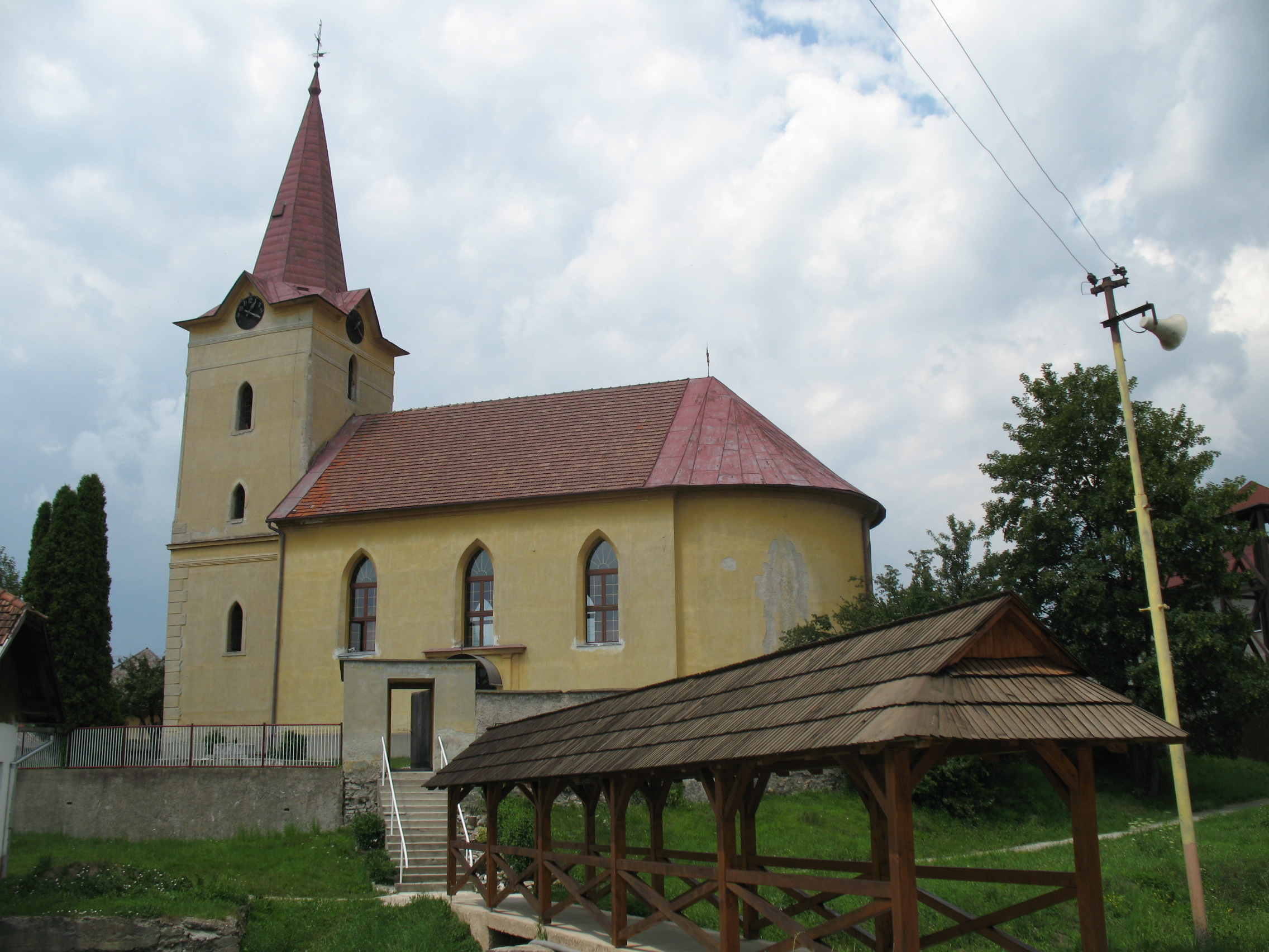 Oláhpatak